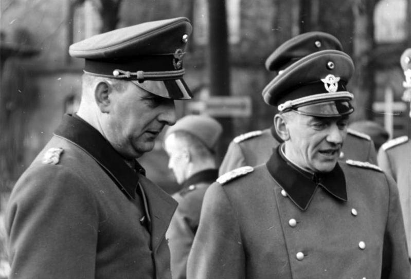 General der Polizei Daluege, Major Fuchs (Luftangr. gefallen) HAOP. [Heeresamt der Ordnungspolizei!] Kfew.